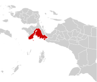 Letak Kabupaten Kaimana